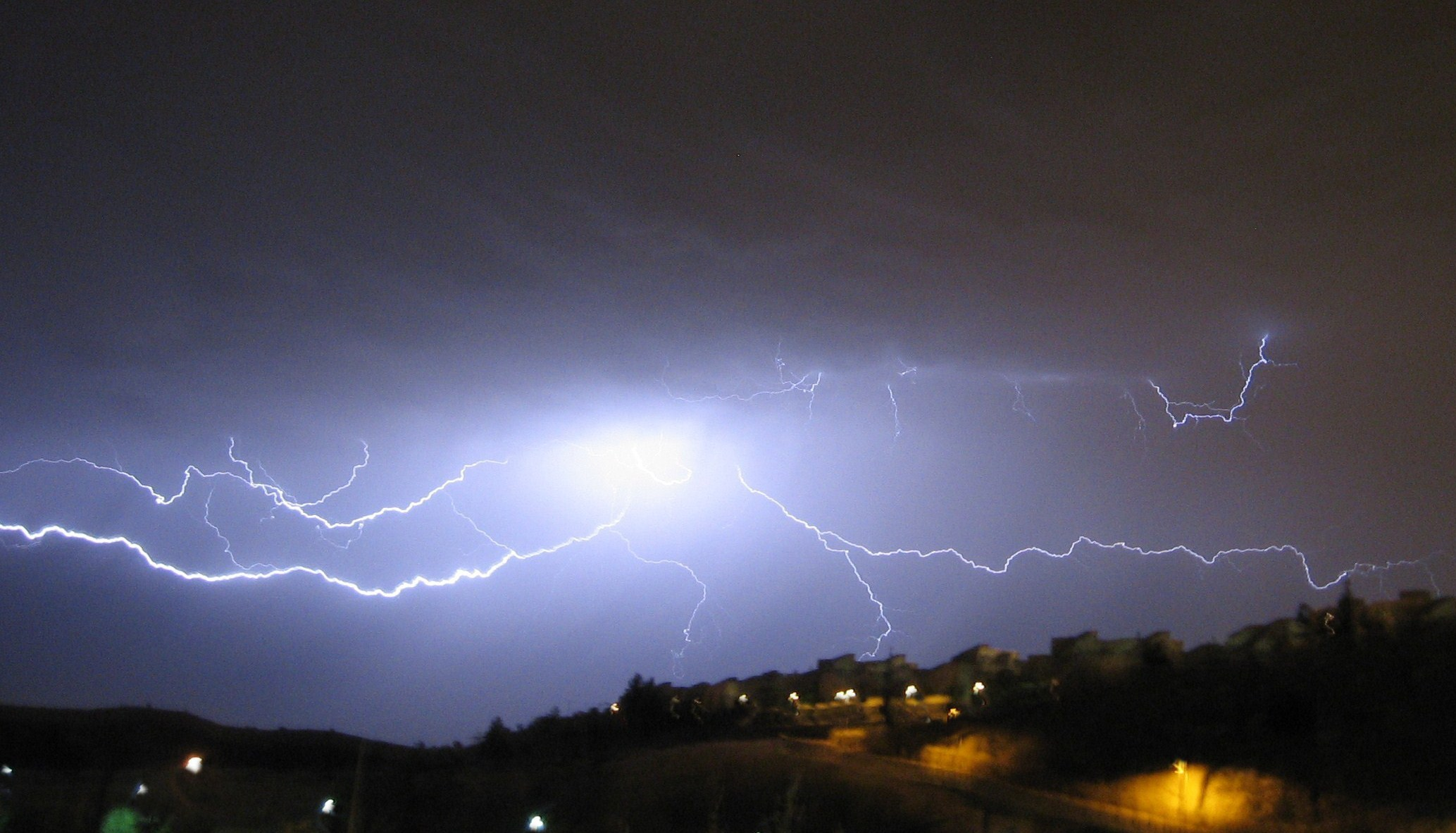 ברק בעיר מודיעין